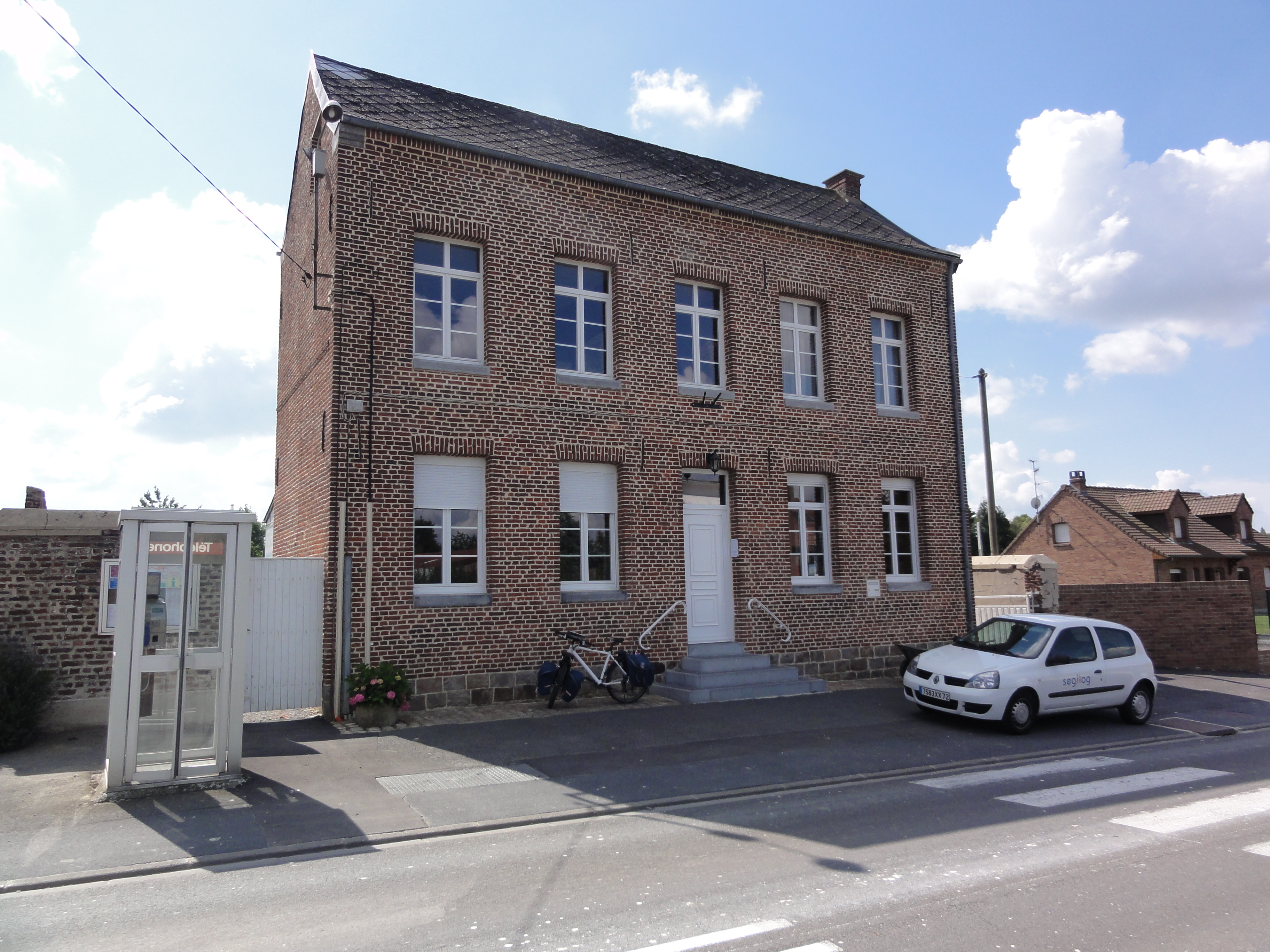 Croix-Caluyau (Nord, Fr) mairie